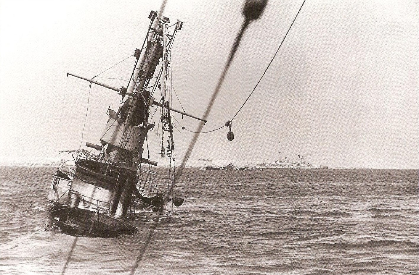 Il cacciatorpediniere Zeffiro affondato da aerosiluranti a Tobruk.